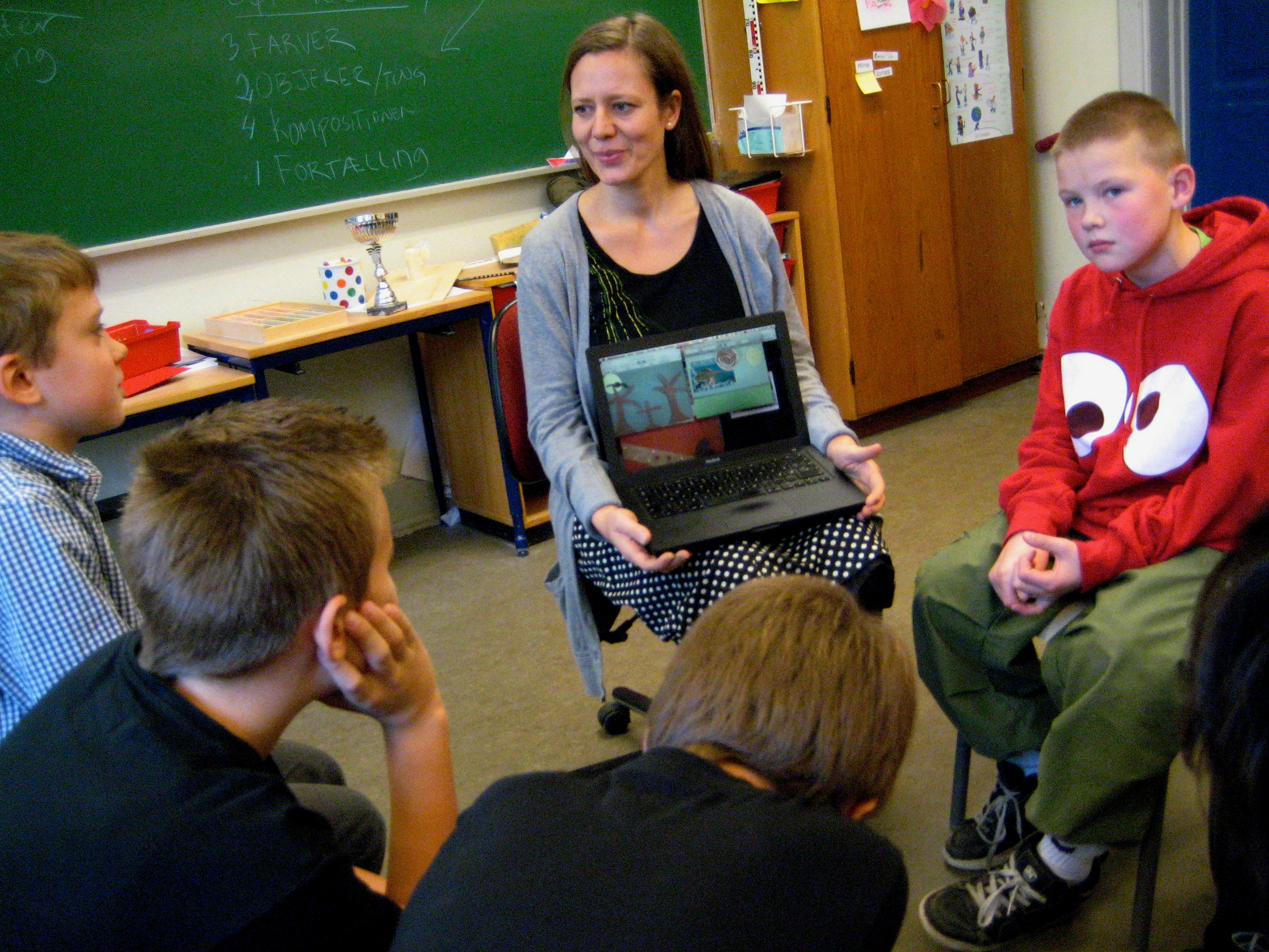 Verden i klassen - klassen i verden, fortællinger i billede og lyd. En workshop for 4.klasse. Her underviser Astrid Lomholt på 2. dagen i billede- og lydcollager